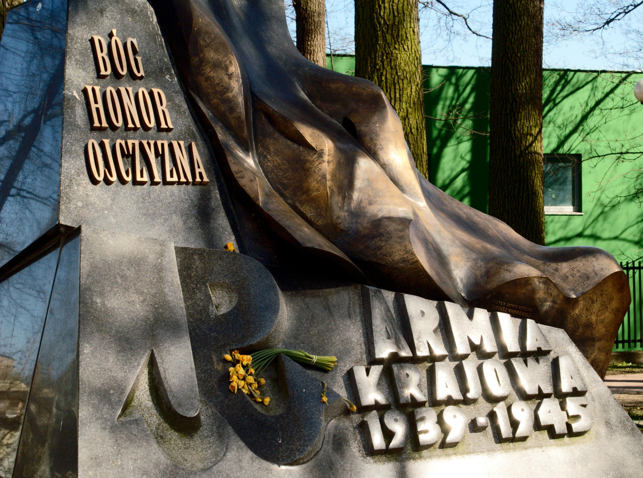 Pomnik AK w Sopocie w parku im. sanitariuszki Inki.